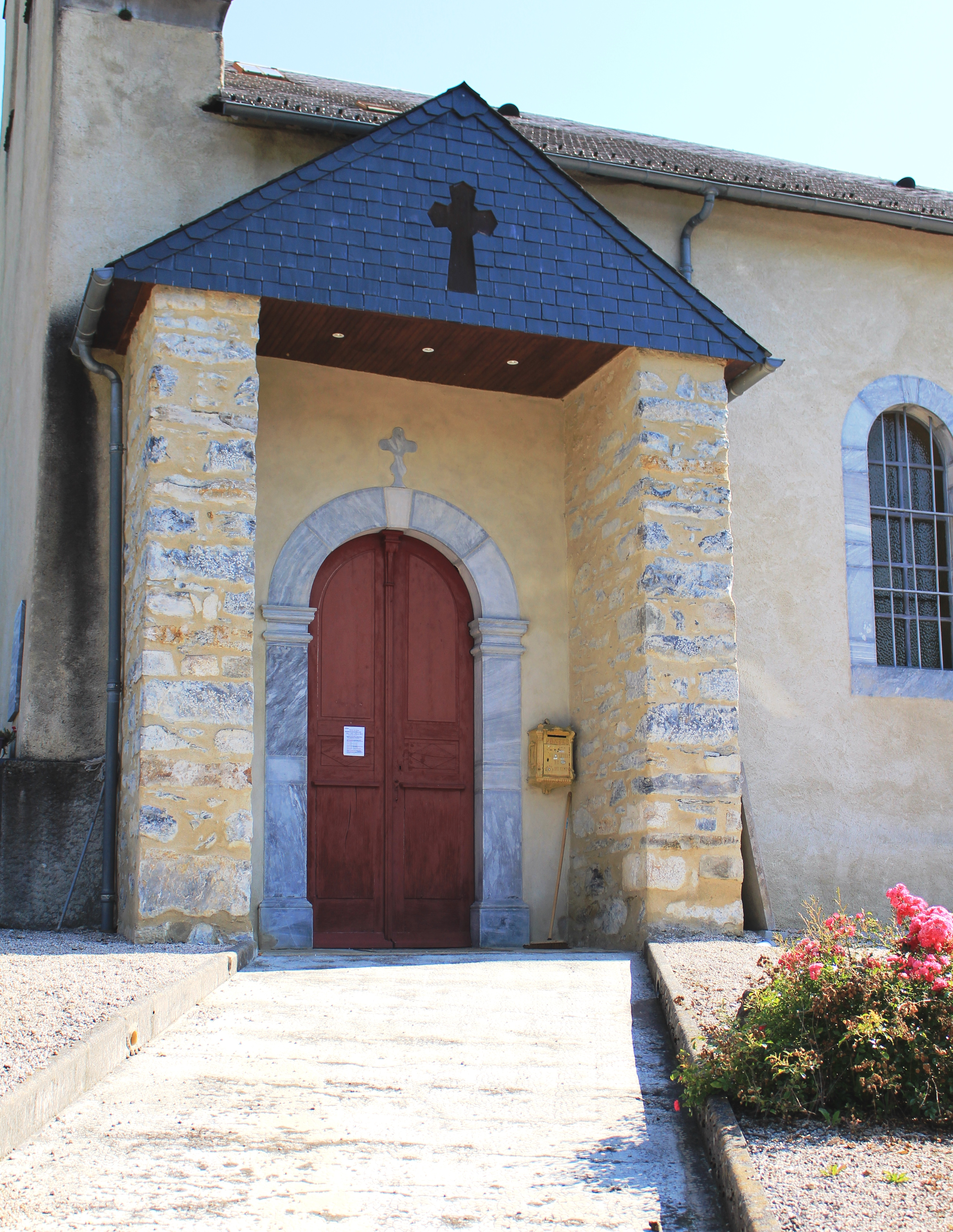 Église Saint-Pierre de Fréchendets (Hautes-Pyrénées)